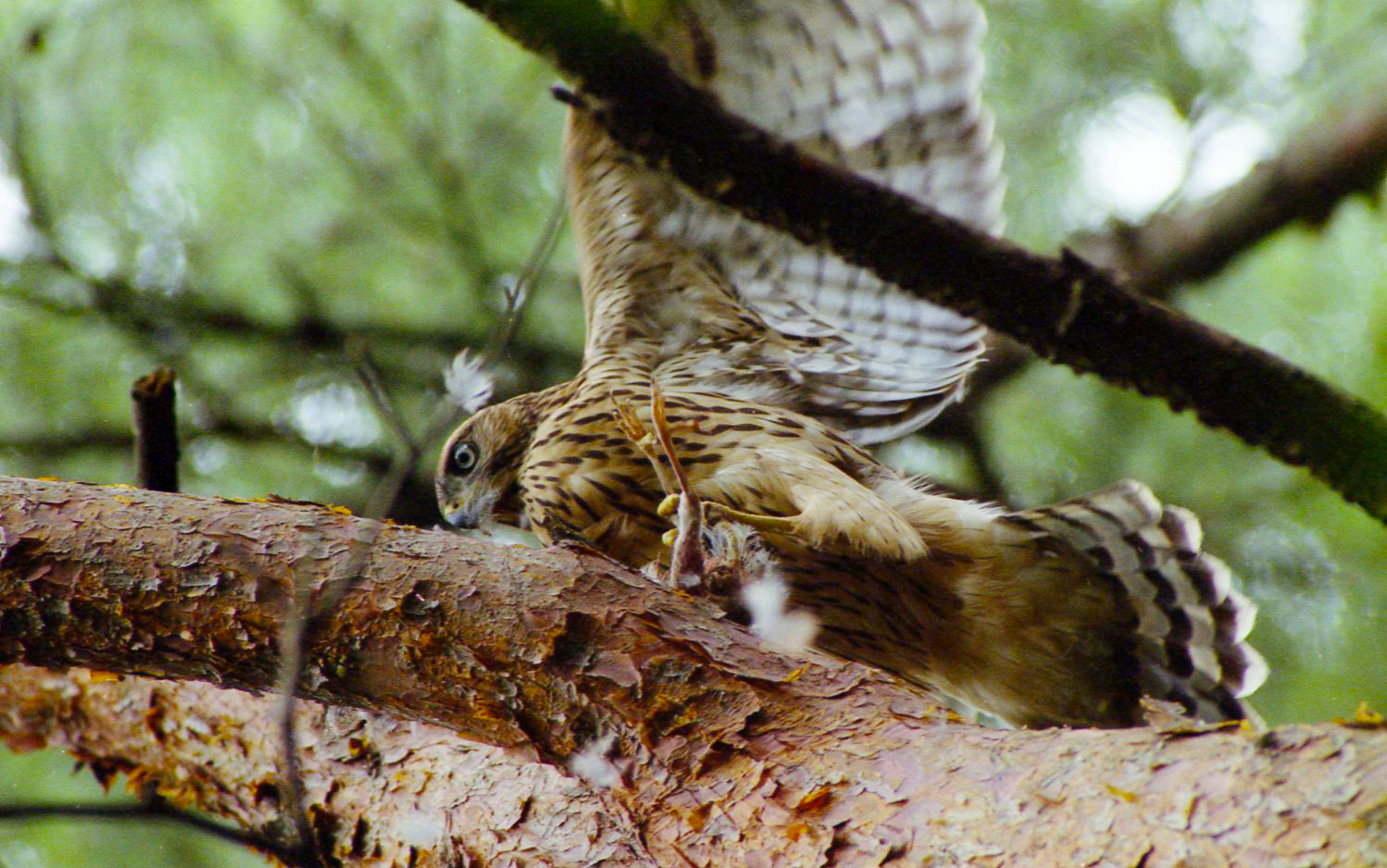 八木沢マタギ オオタカの巣立ち直前のヒナ